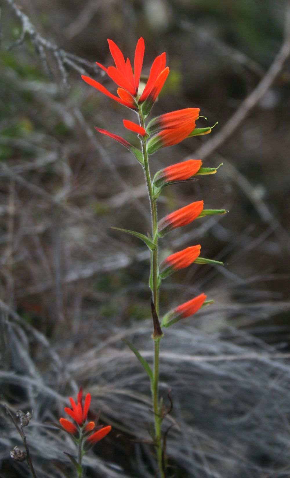 Castilleja integrifolia var. integrifolia, Sommerwurzgewächse (Orobanchaceae) – Kolumbien/Colombia: Dpto. Cundinamarca, Parque Nacional Natural Chingaza, Sendero Lagunas de Siecha, ca. 11–12 km SSE Guasca, ca. 3450 m